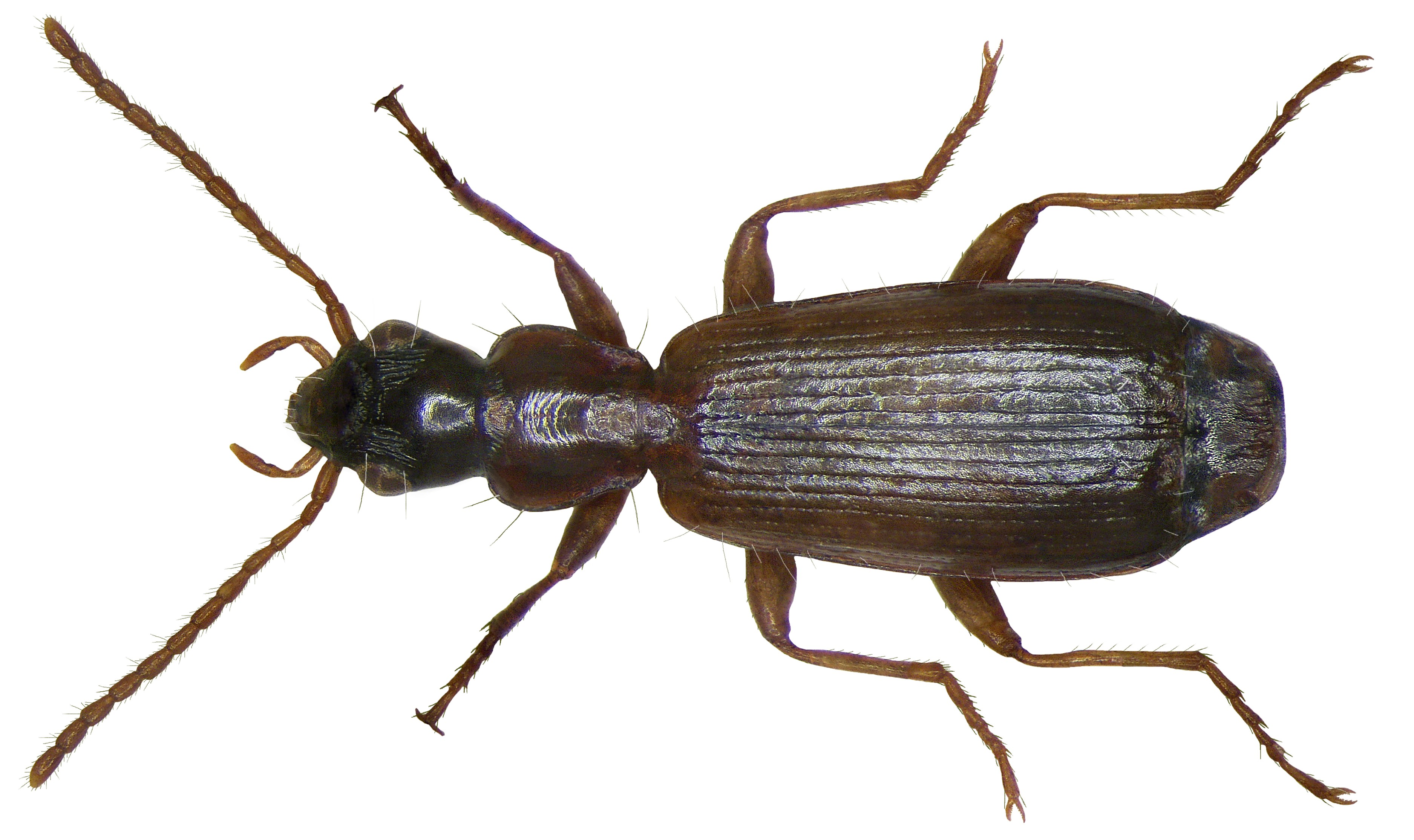 Familie: Carabidae Größe: 4,0-5,6 mm Verbreitung: Europa, Nordafrika, Westasien, Kaukasus Ökologie: in trockenen und in feuchten Biotopen Fundort: Germania, Oberfranken, Kulmbach leg.det. U.Schmidt, 1975 Foto: U.Schmidt, 2008